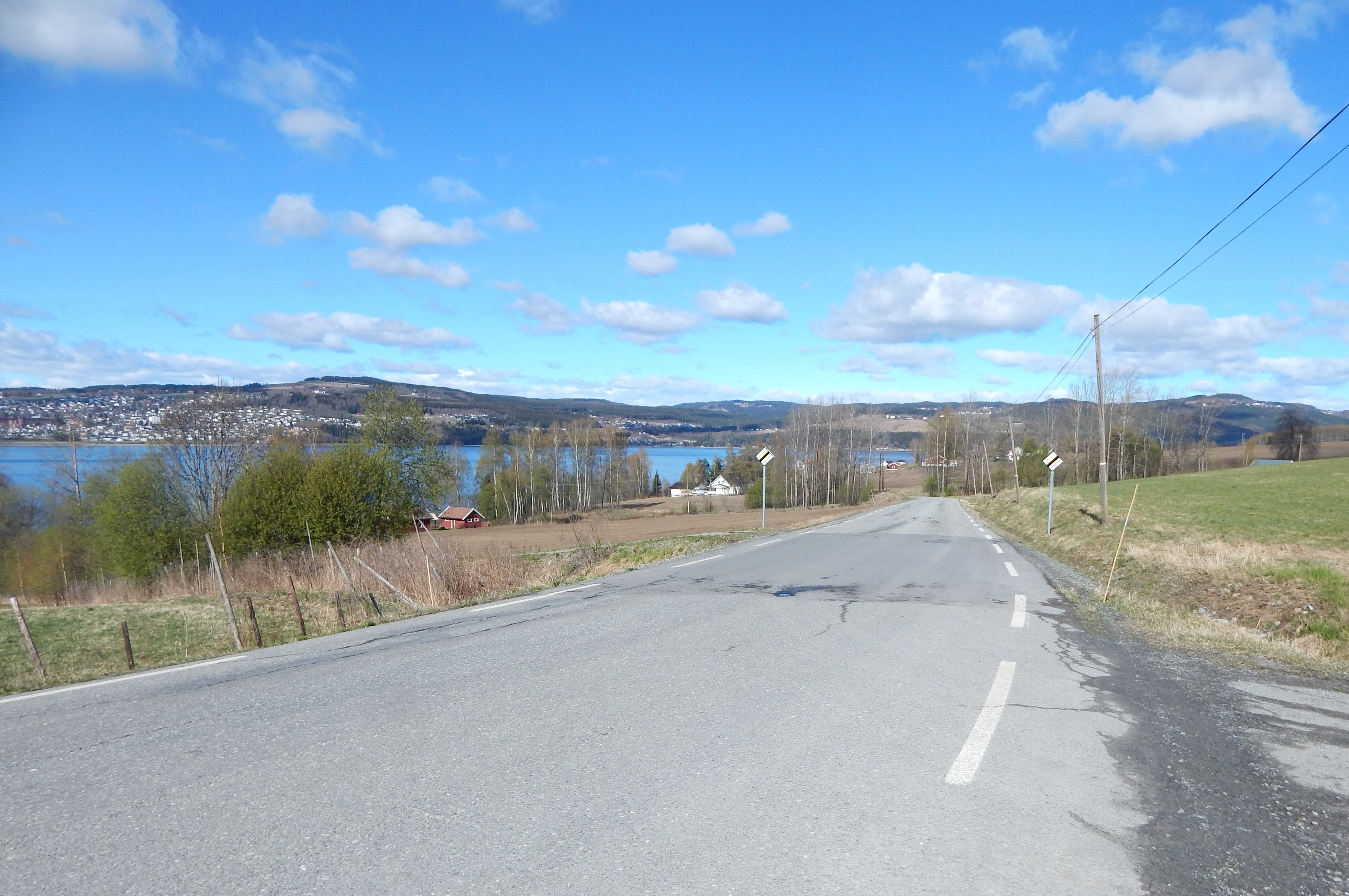 Mengsholvegen (fylkesvei 85) nord for Taskerud